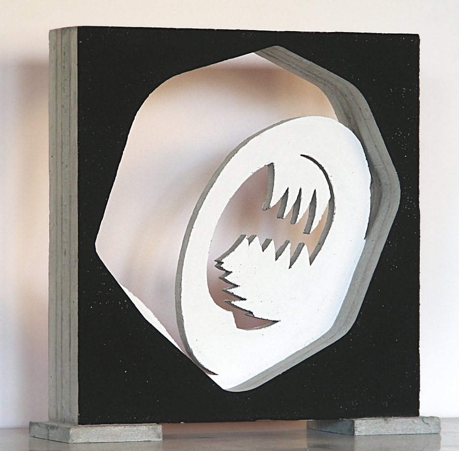 "Bildnis der Mutter". Betonskulptur von Gerhard Roese, 2007, private Sammlung